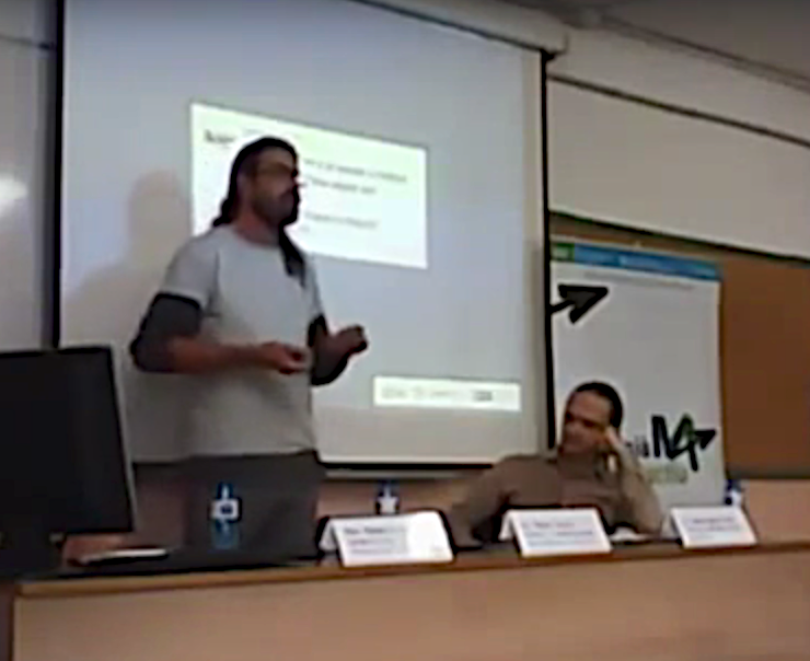 Natxo Tarrés a II Jornades Montsià Actiu. Espai Innovació Social. Ins Montsià.